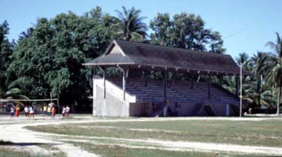 Tribune principale du stade national des Kiribati en 1998, avec un toit typique des Maneaba traditionnelles et un terrain sans gazon.